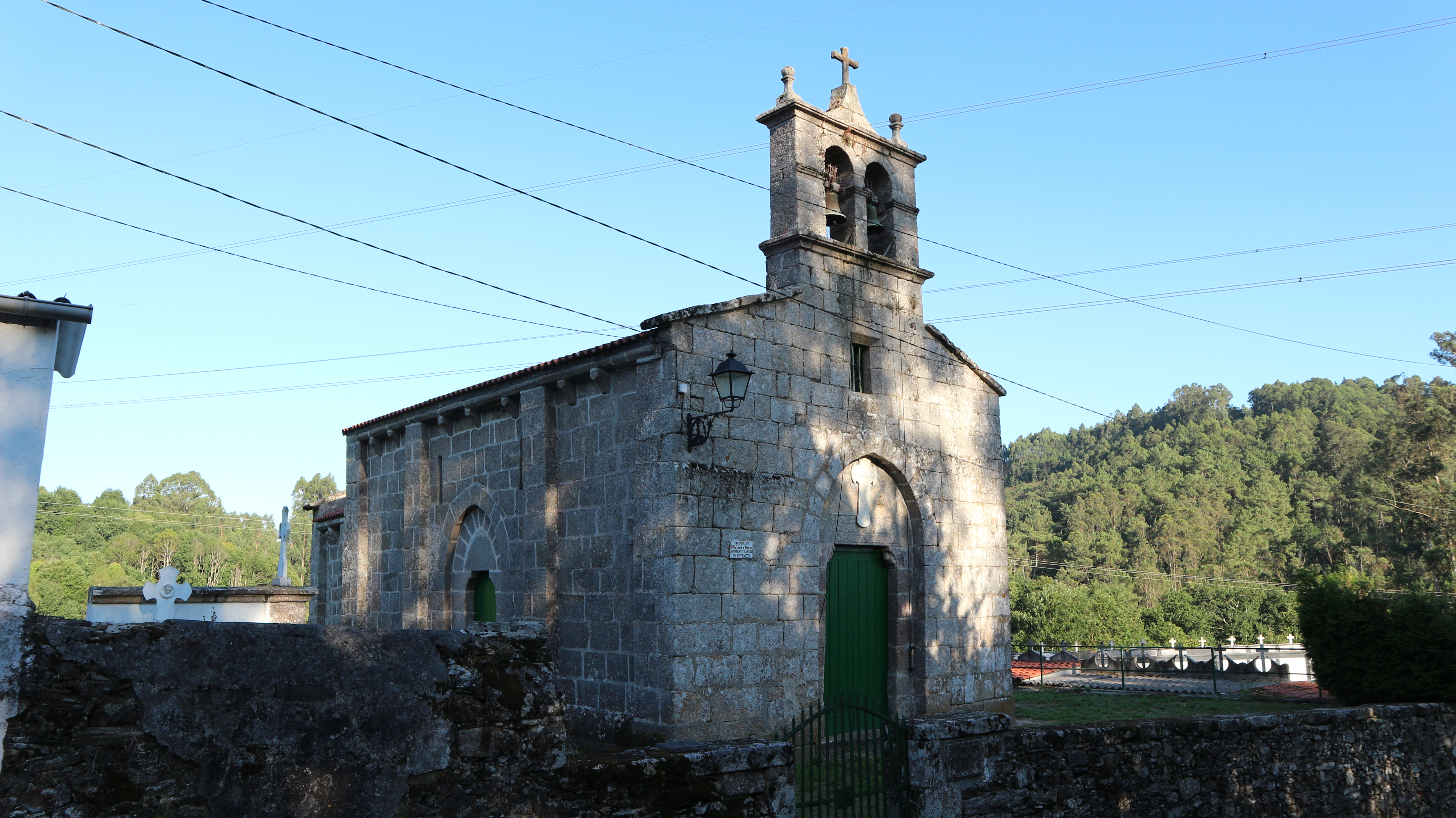 Igrexa de San Martiño de Brabío. O Martinete, Brabío, Betanzos.